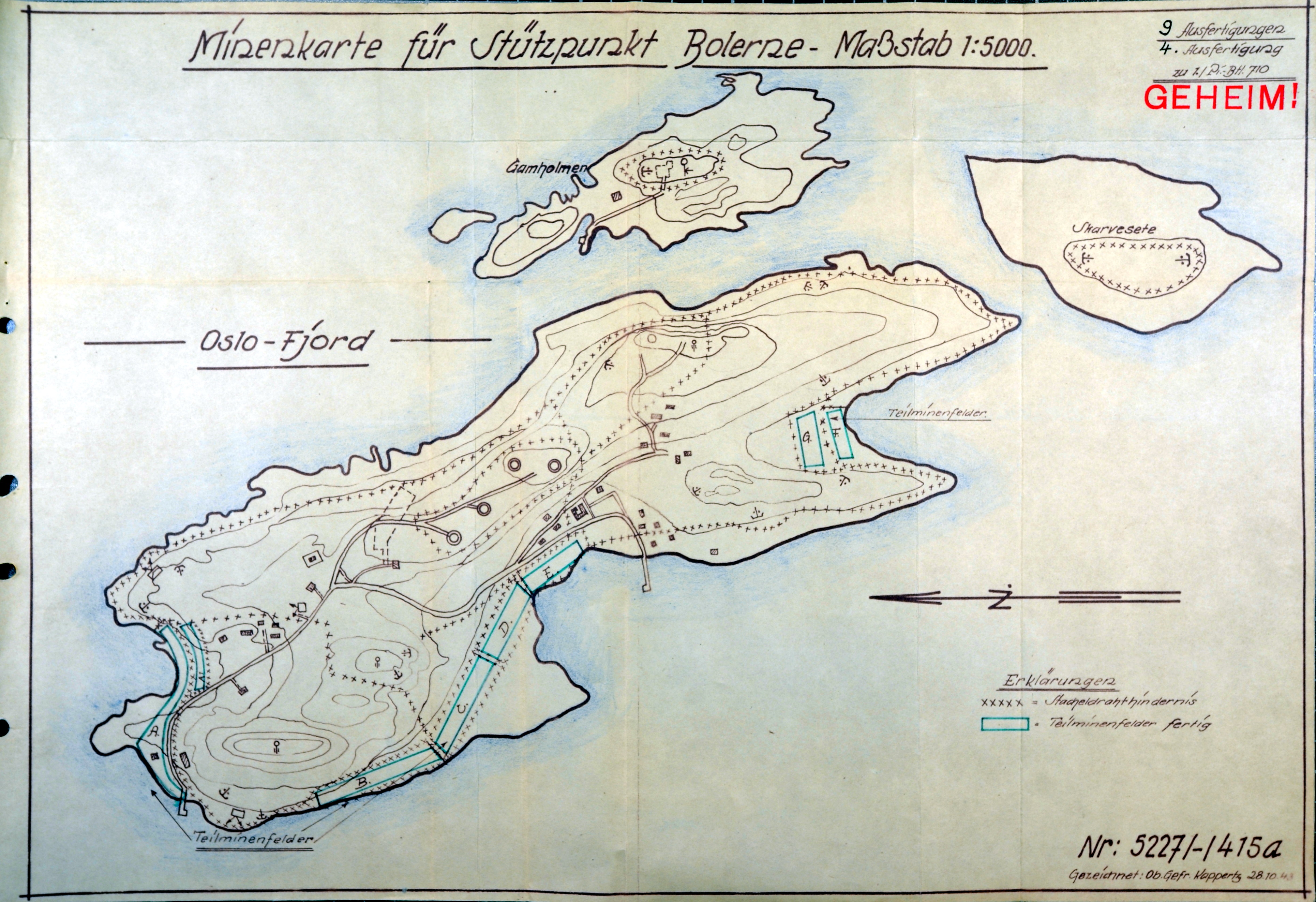 Tysk minekart over Bolærne fort fra andre verdenskrig